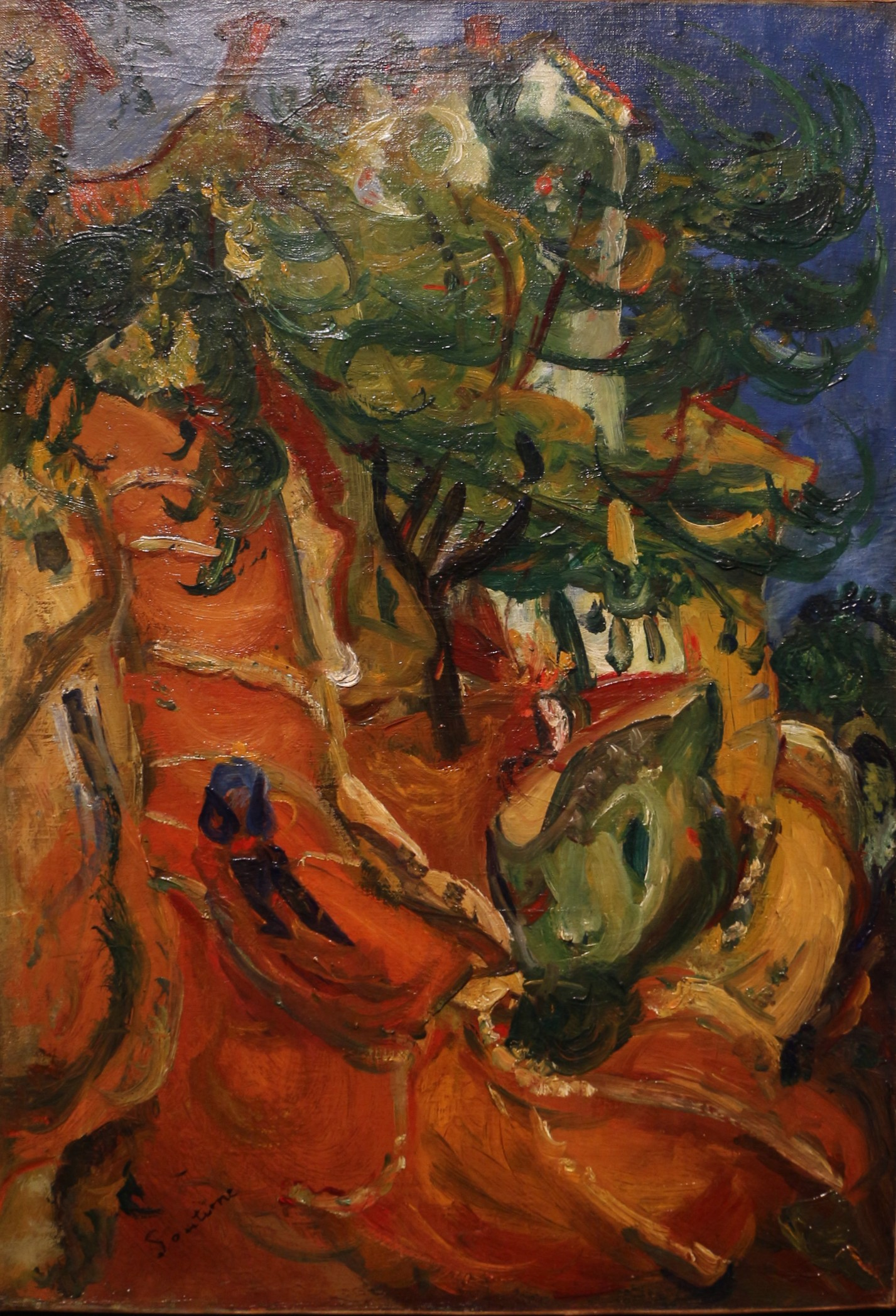 Chaïm Soutine (1893-1943), Paysage à Cagnes, huile sur toile, 55 x 38 cm.